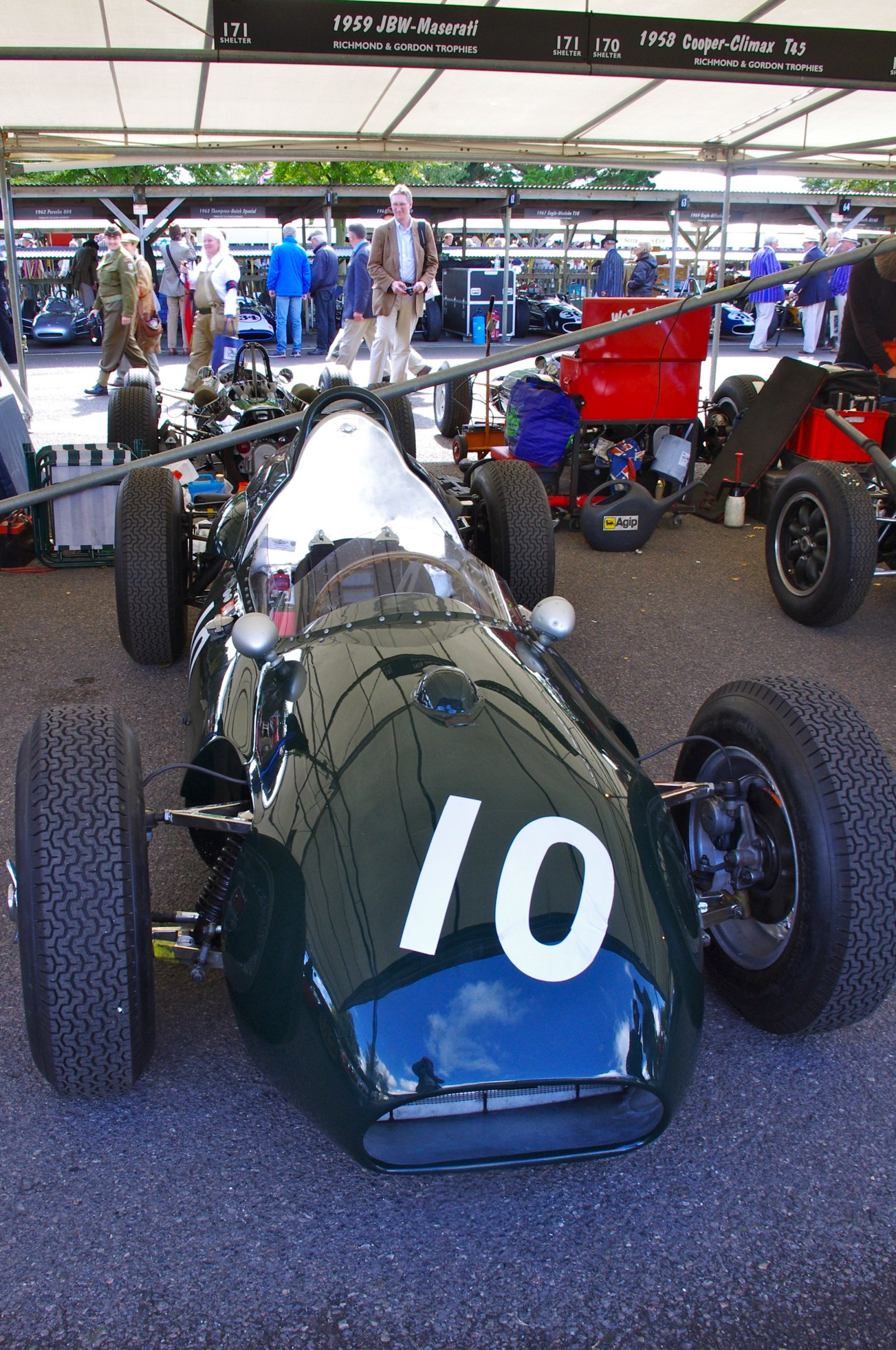 Goodwood Revival 2012